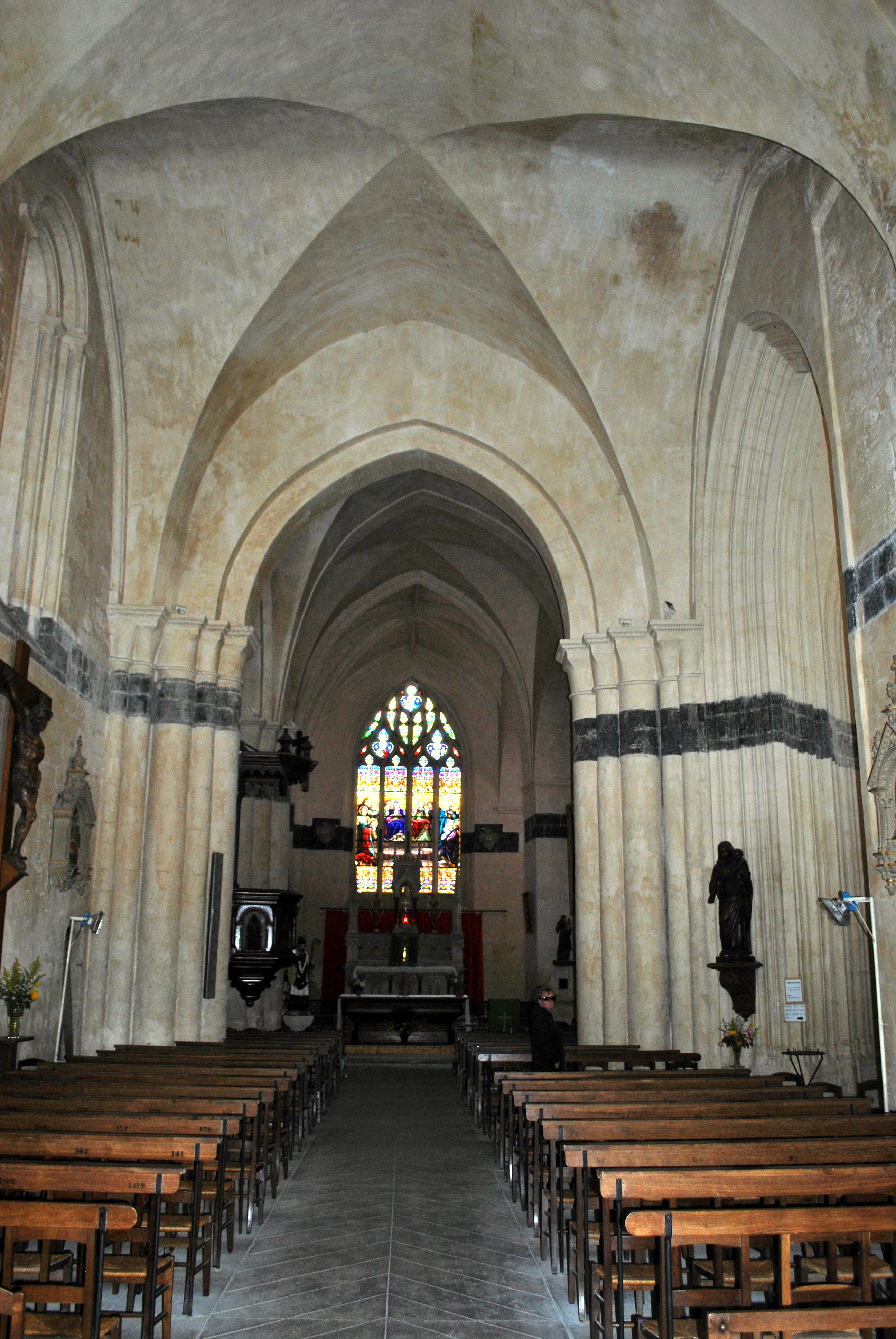 Intérieur de l'église Saint-Fortunat de Saint-Fort-sur-Gironde